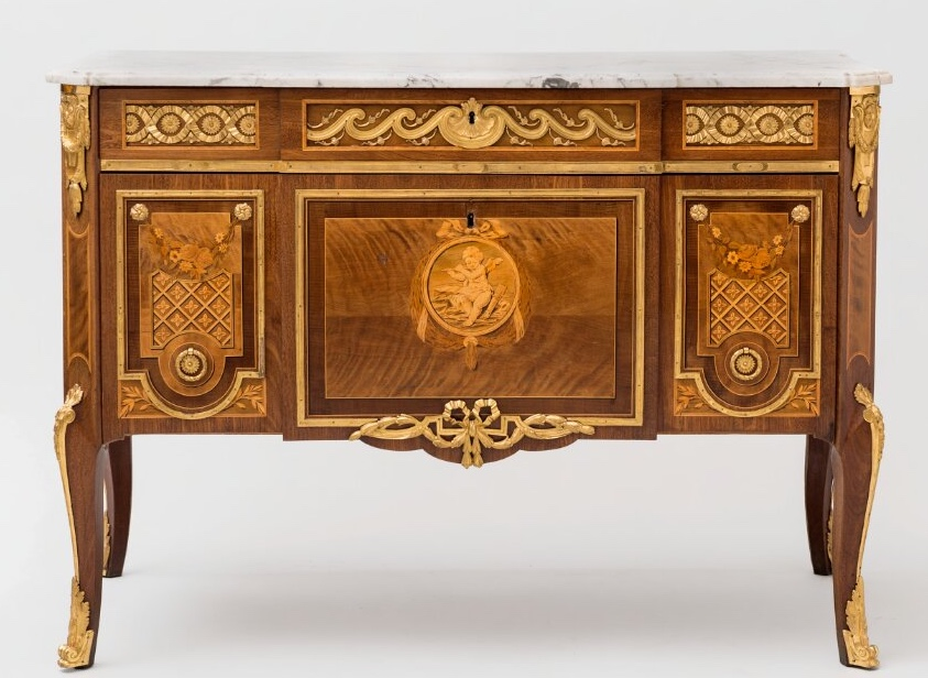 Georg Haupt gjorde en gesällvandring till Paris och London. När han kom tillbaka till Sverige var hans kunskaper eftertraktade och drottning Lovisa Ulrika beställde ett skrivbord av honom. Därefter blev Haupt den mest uppskattade möbelsnickaren i Stockholm. Byrån är ett exempel på hans mogna stil med nyklassicistiska bronsbeslag och intarsiaarbete i form av en putto.